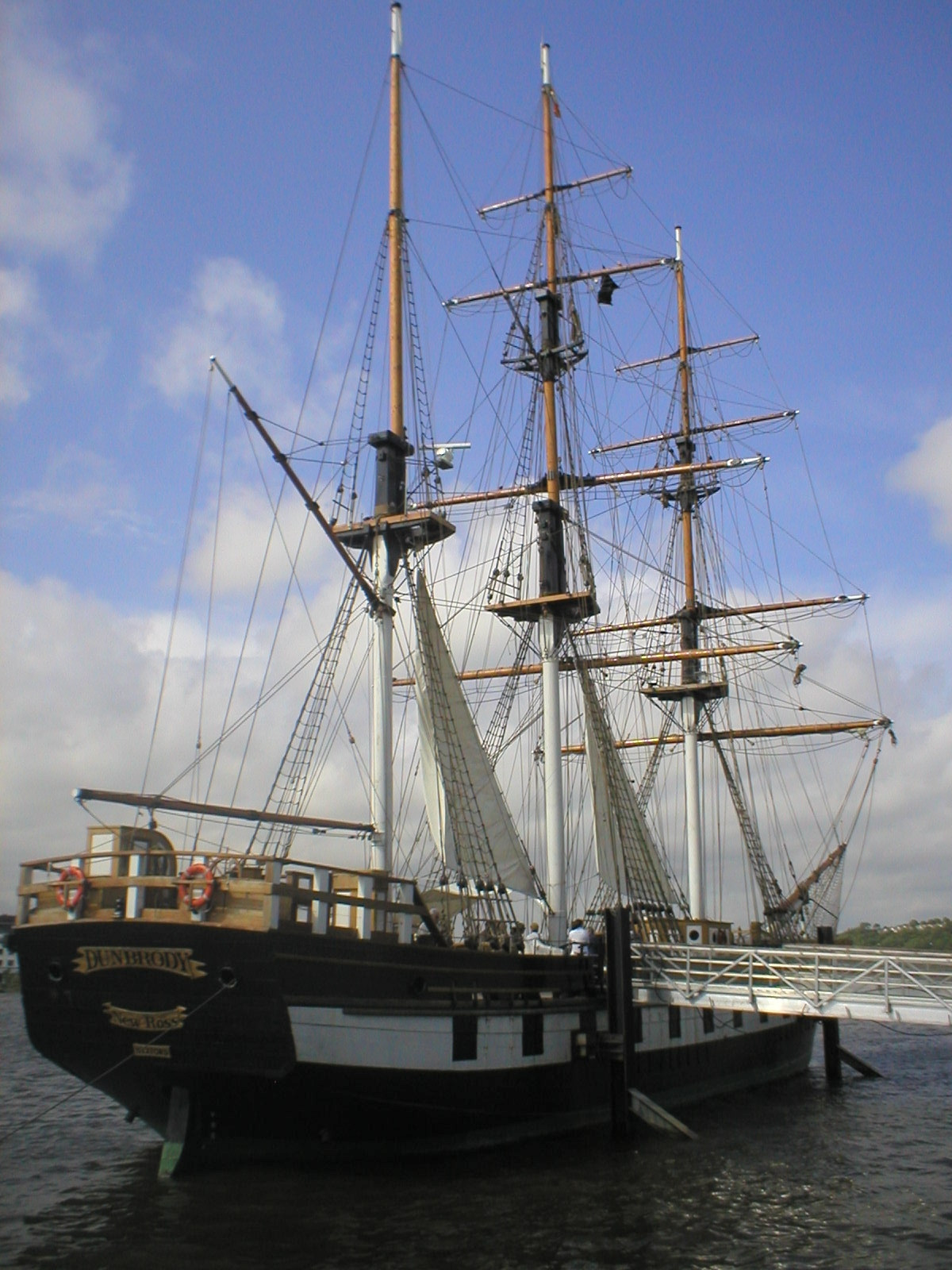 Dunbrody sailing ship